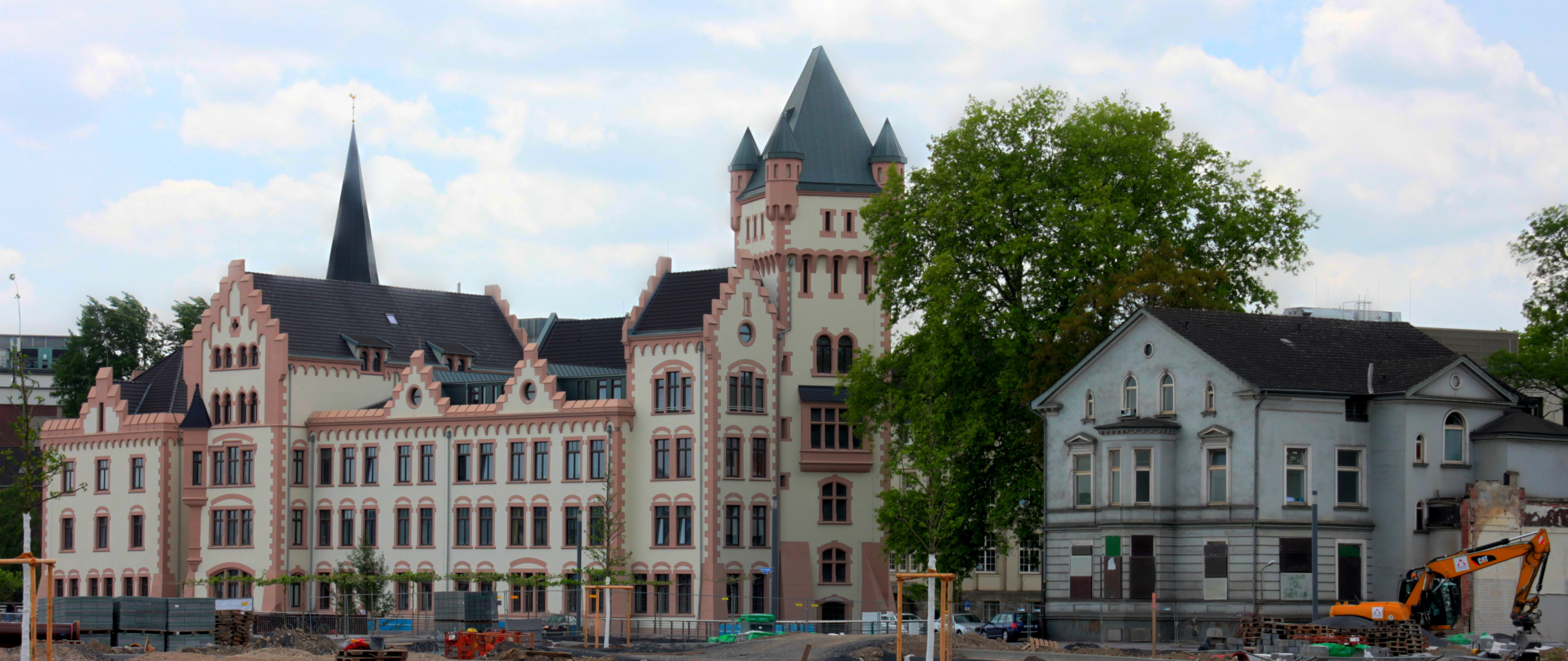 Hörder Burg, am Phoenix-See Hörde